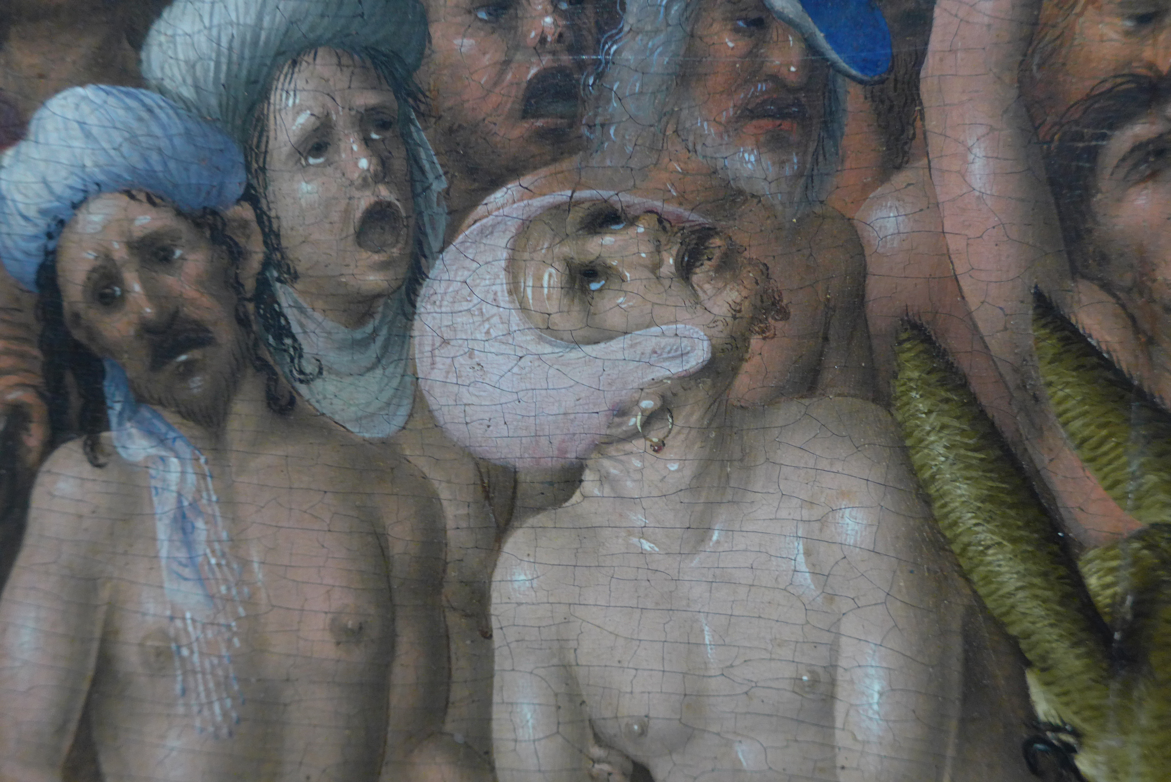 Verdammter mit Ohrring. Detail aus dem Weltgericht von Stefan Lochner, Tafelbild um 1435, Wallraf-Richartz-Museum & Fondation Corboud, Köln